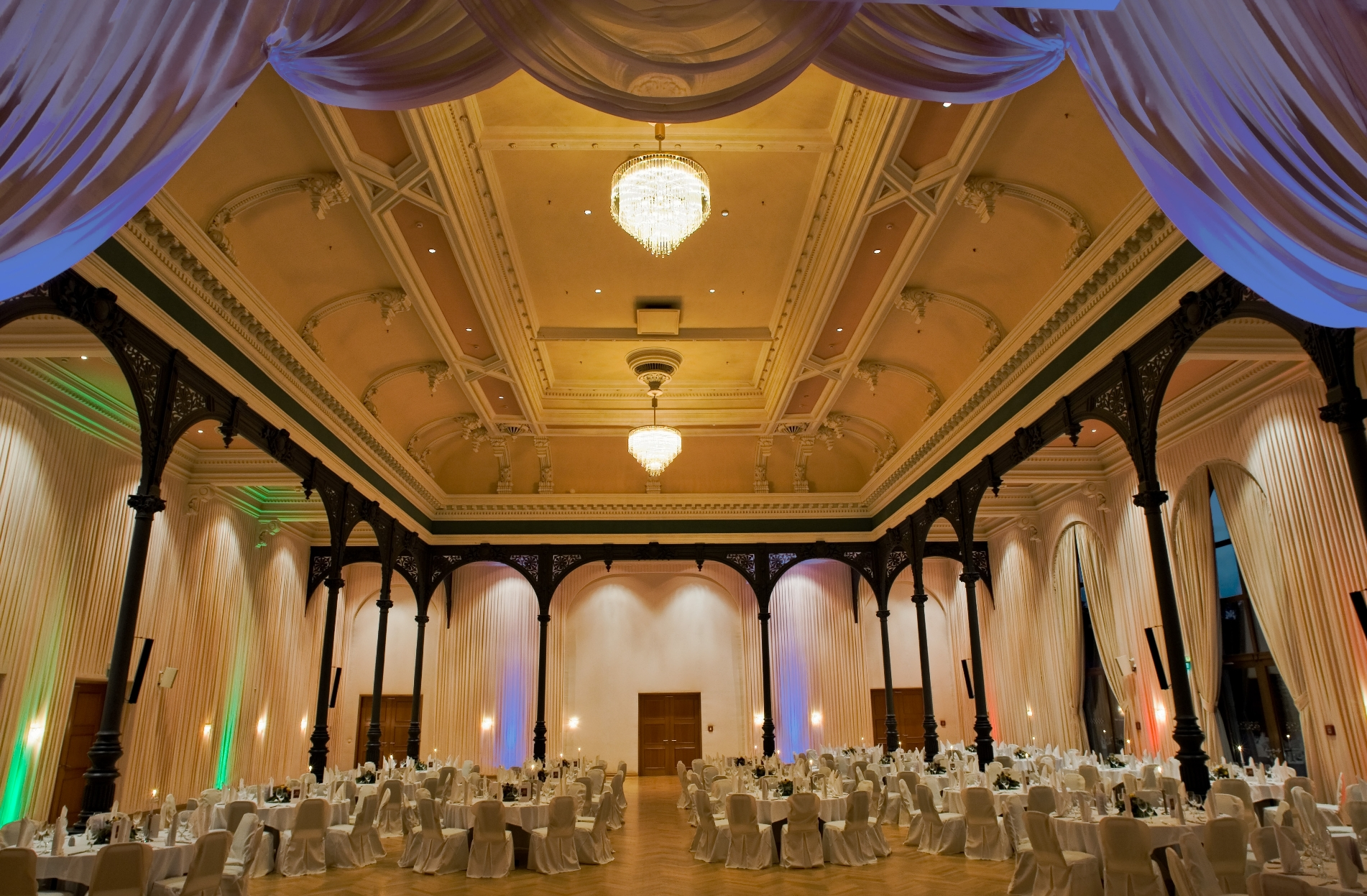 Der Ballsaal Lindengarten mit Beleuchtungskonzept für eine Abendveranstaltung.